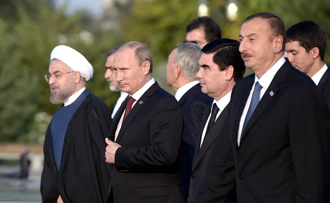 IV Каспийский саммит. Во время совместной прогулки по набережной Волги.